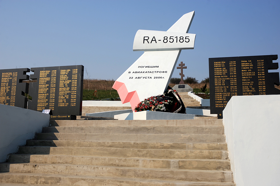 Мемориал